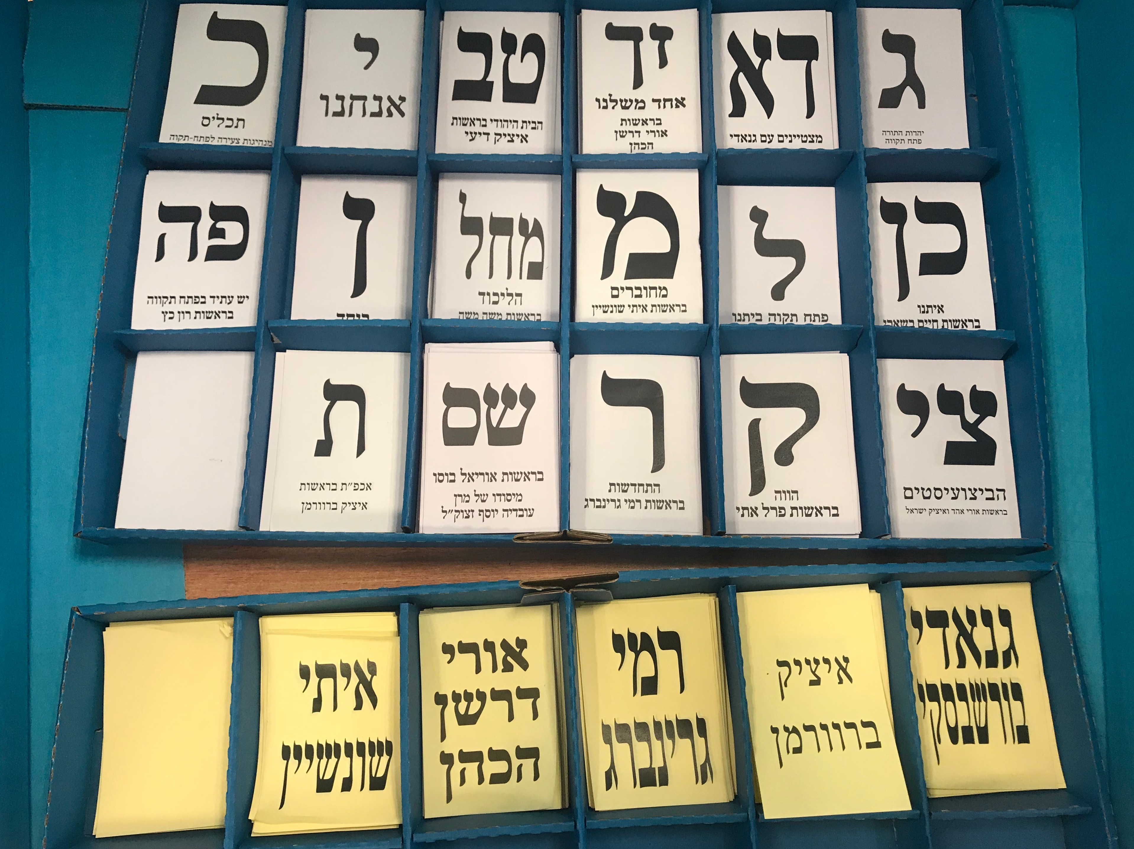 פתקי הצבעה בבחירות לעיריית פתח תקווה, 2018